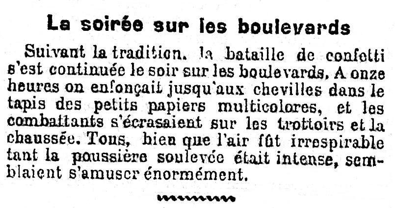 La bataille de confettis sur les grands boulevards le soir de la Mi-Carême 1897.